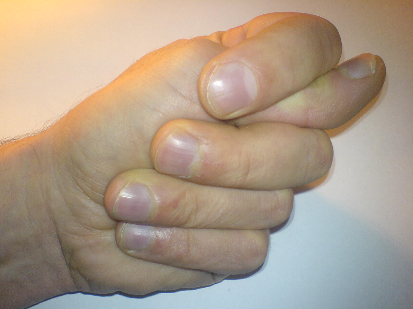 На фотографии изображен классический «шиш» («кукиш», «дуля», «фига») - фигура, свёрнутая с помощью пальцев руки для выражения эмоций.